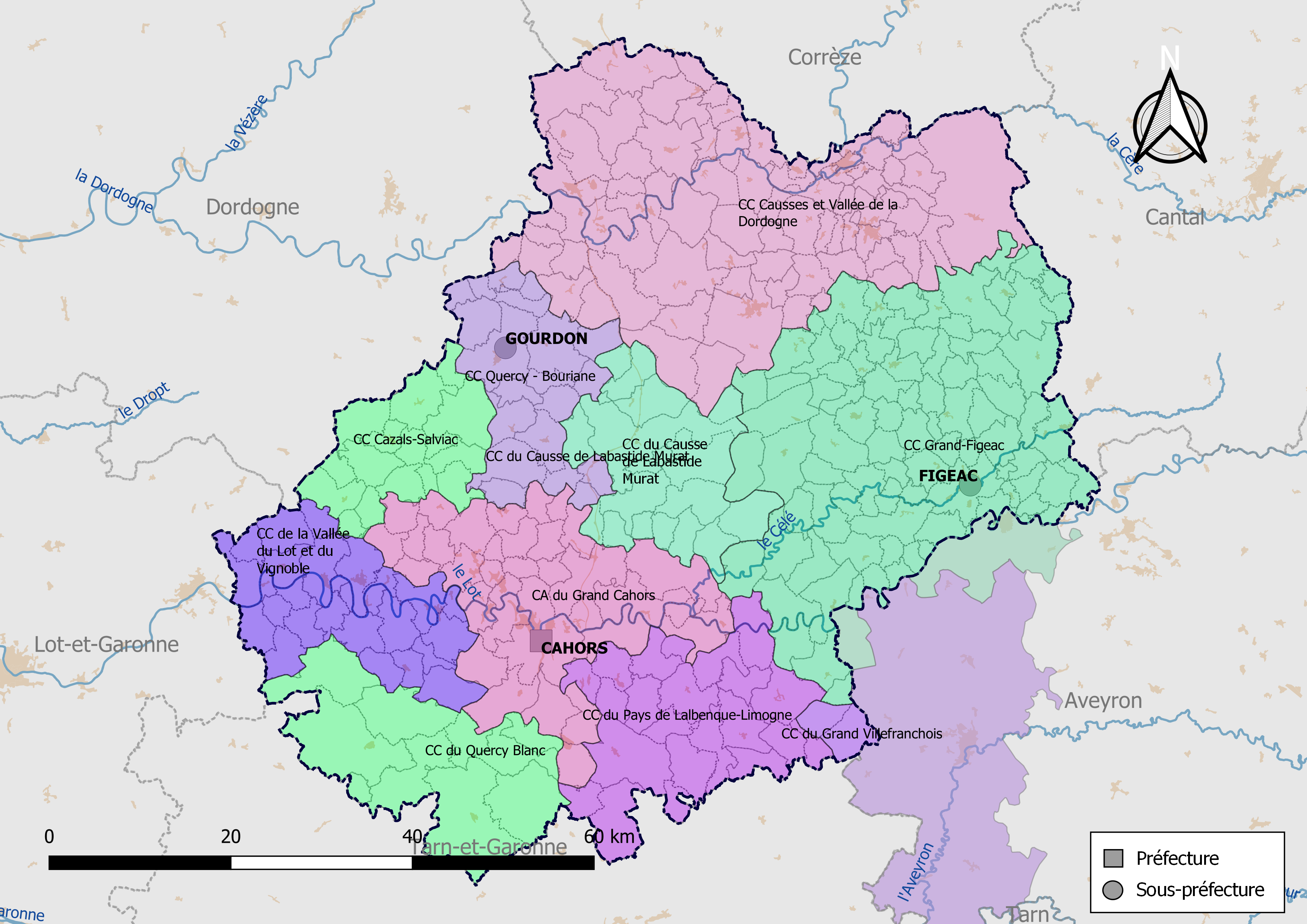 Carte des intercommunalités du département du Lot, France. Composition au 1er janvier 2019.